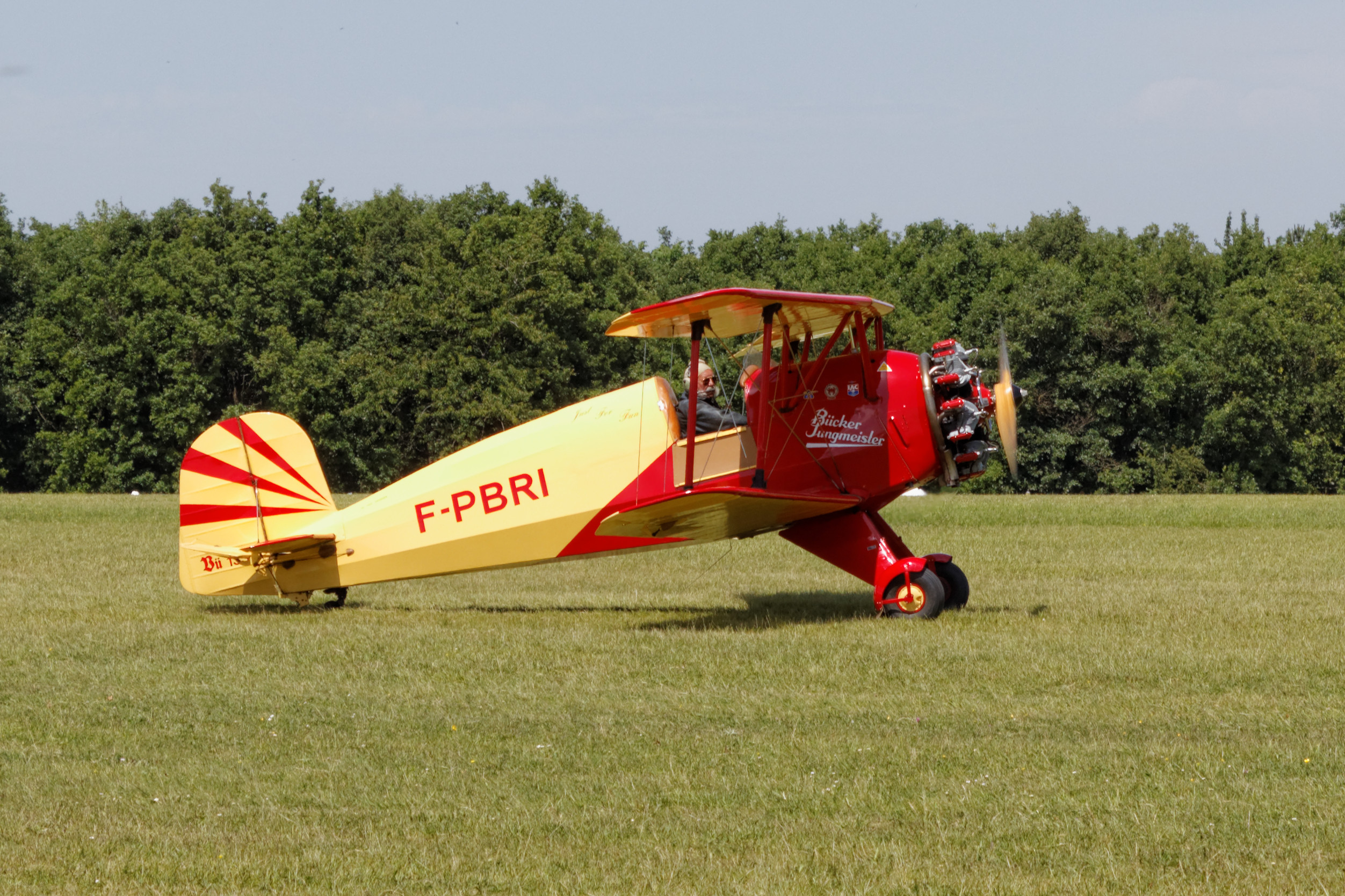 A compléter